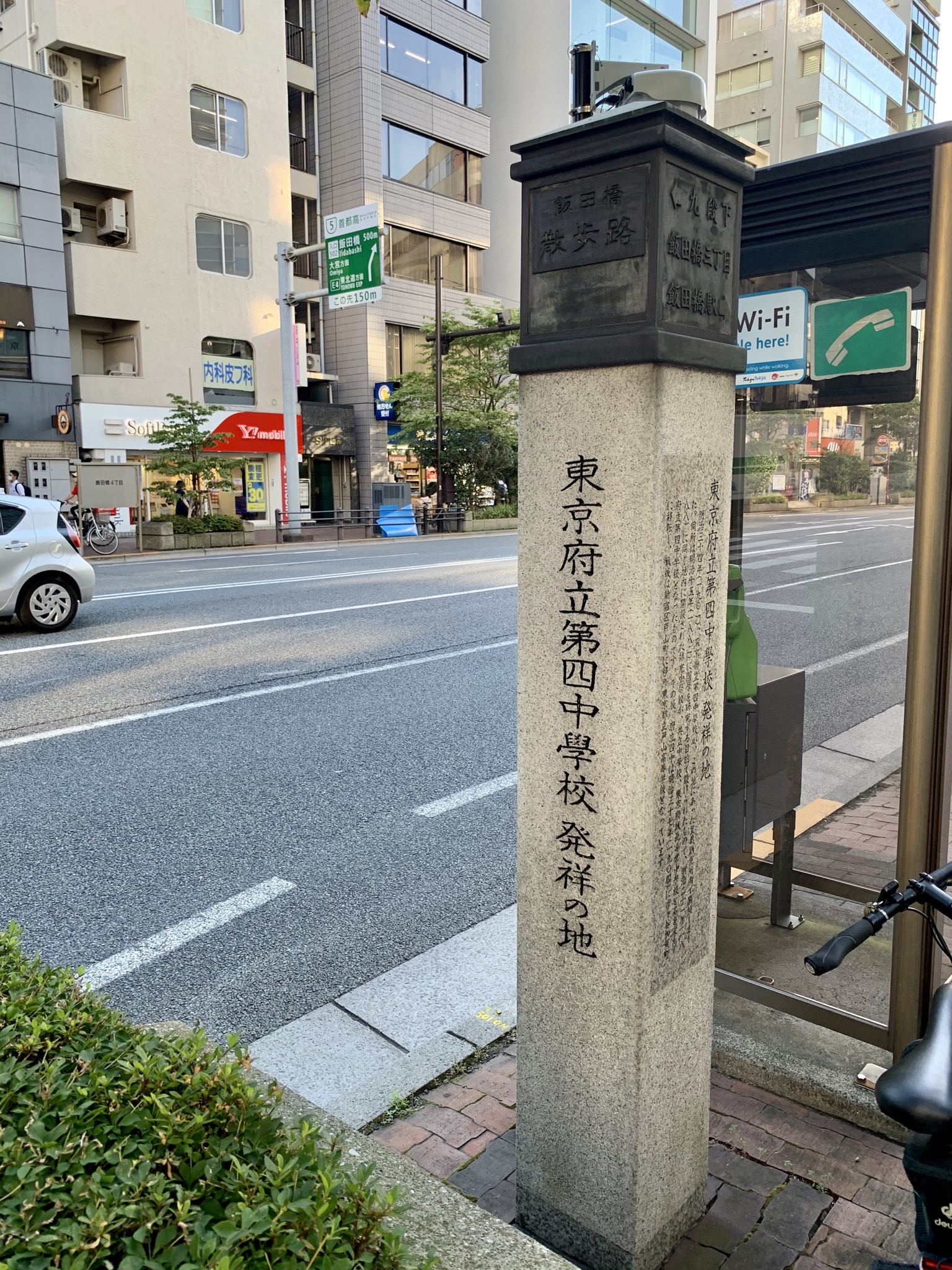 東京区政会館前の「東京府立第四中学校発祥の地」の碑